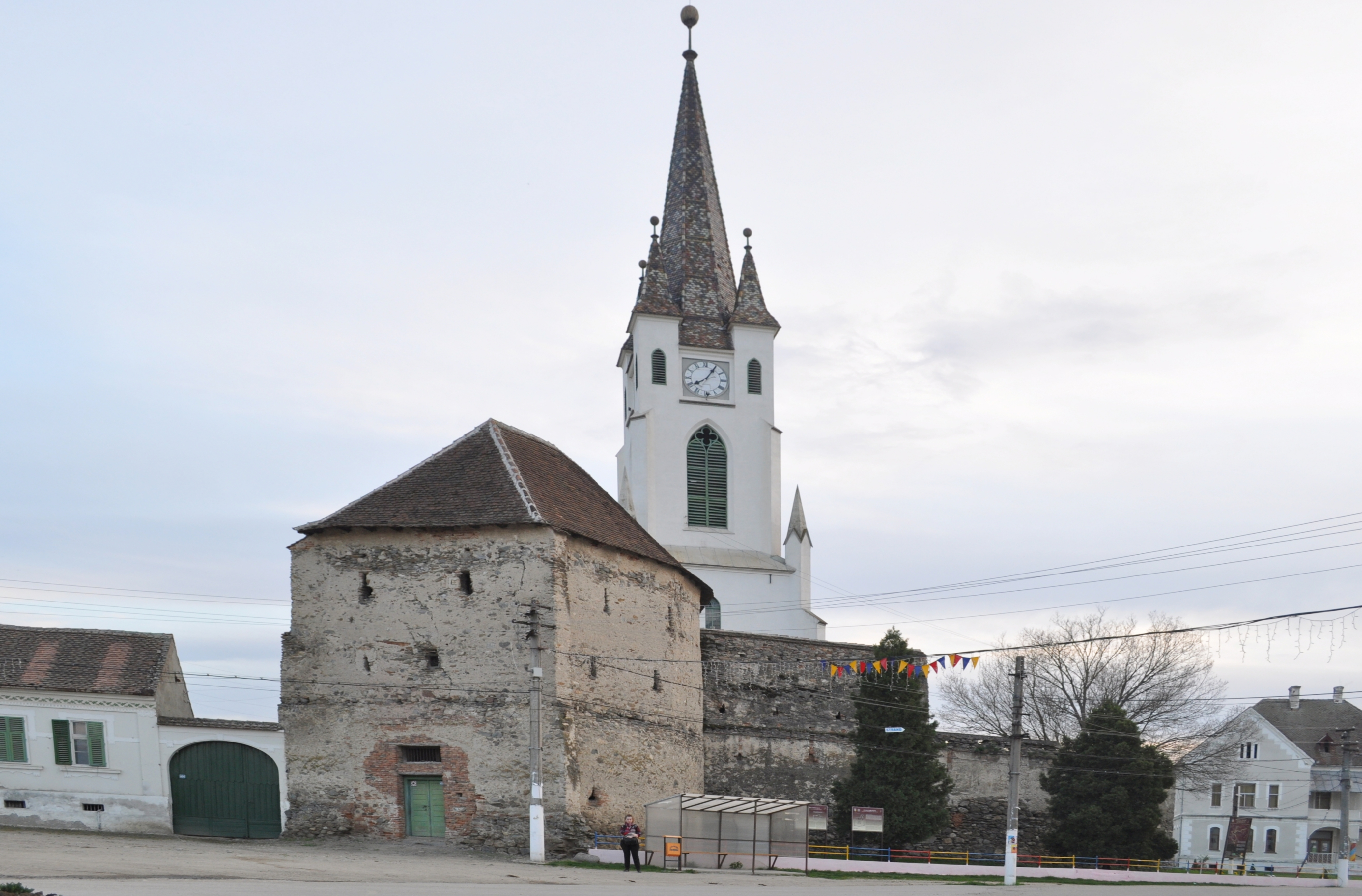 Die Kirchenburg in Gârbova, Kreis Alba, Rumänien